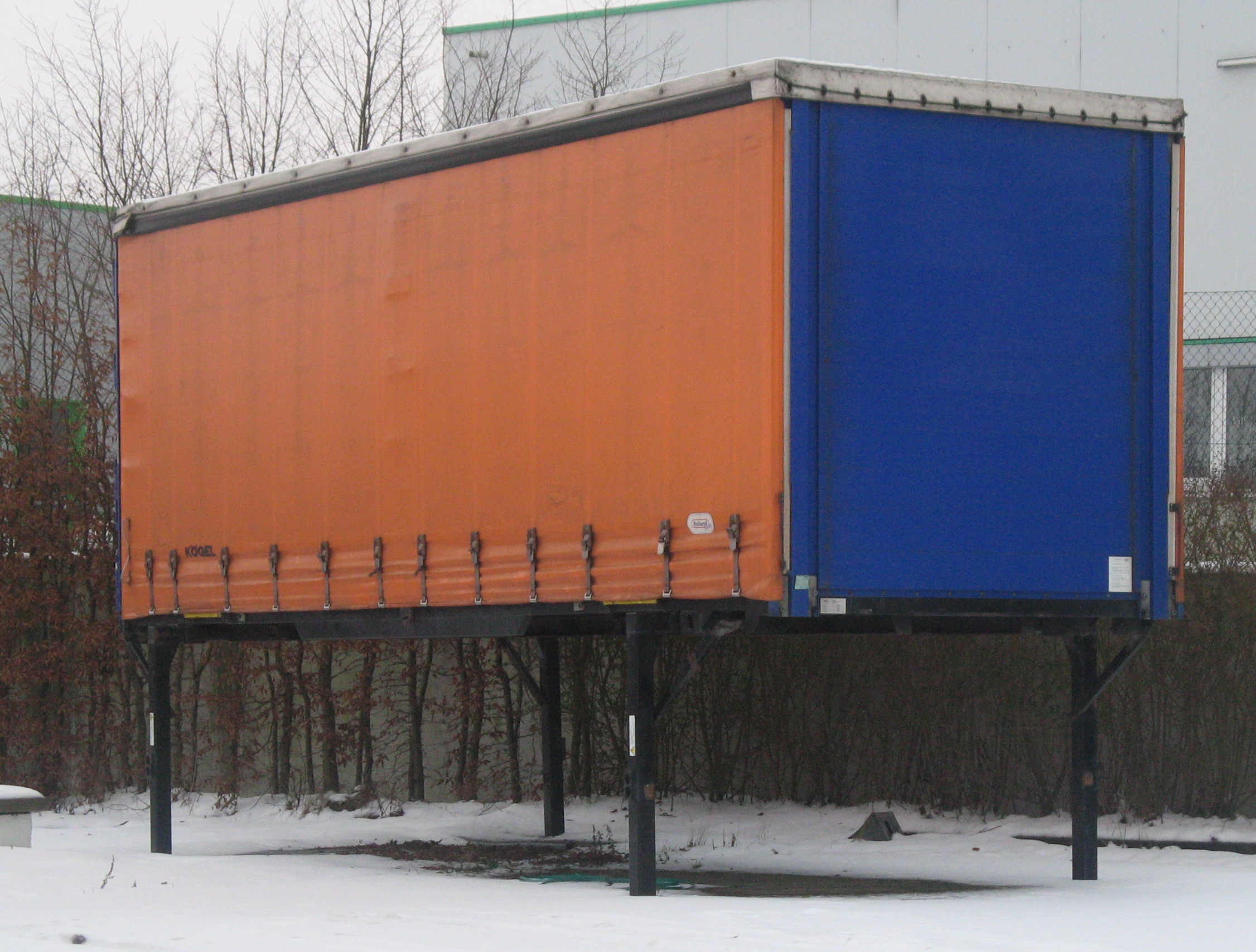 Wechselbrücke für Wechselbrückenanhänger der ersten Bergungsgruppe des THW Ortsverbands Bad Oldesloe des THW